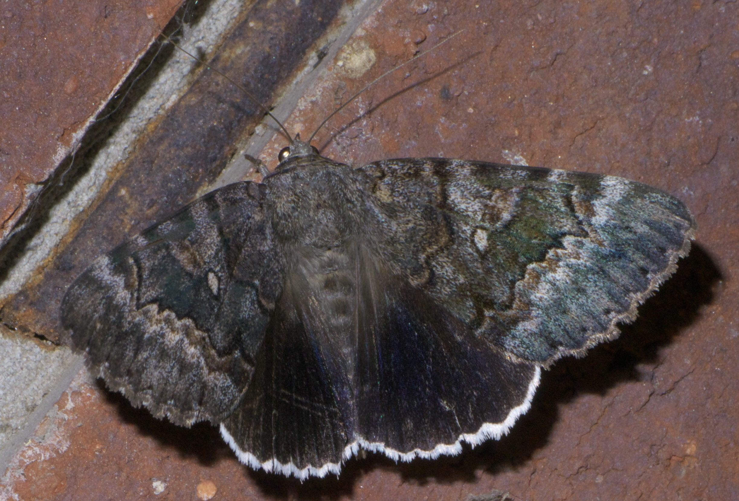 Catocala epione, epione underwing, ID Confidence: 92